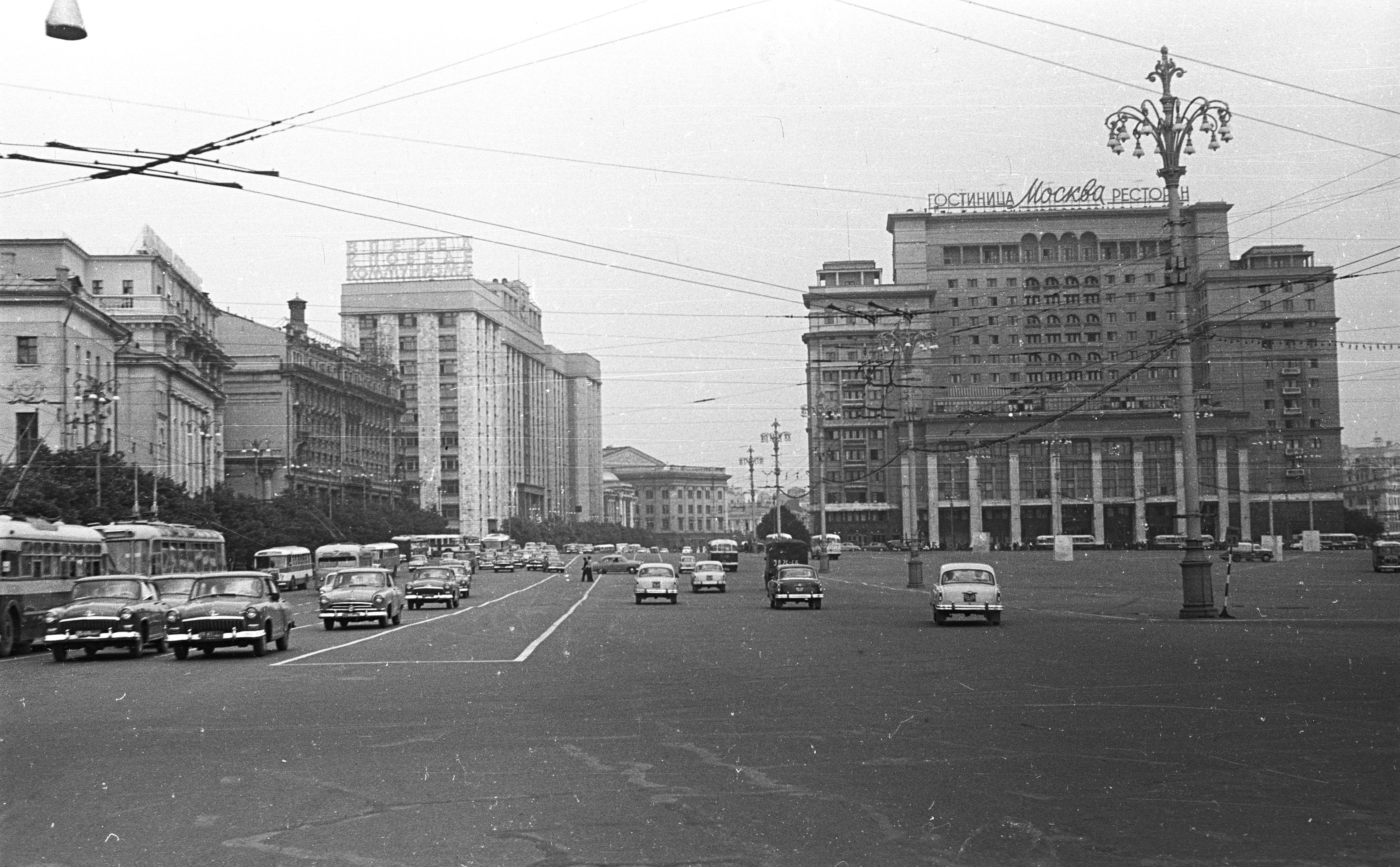 Manézs tér, Moszkva Szálló. Location: Russia, Moscow Tags: trolley bus, Soviet Union, hotel, restaurant, lamp post Title: Manézs tér, Moszkva Szálló.